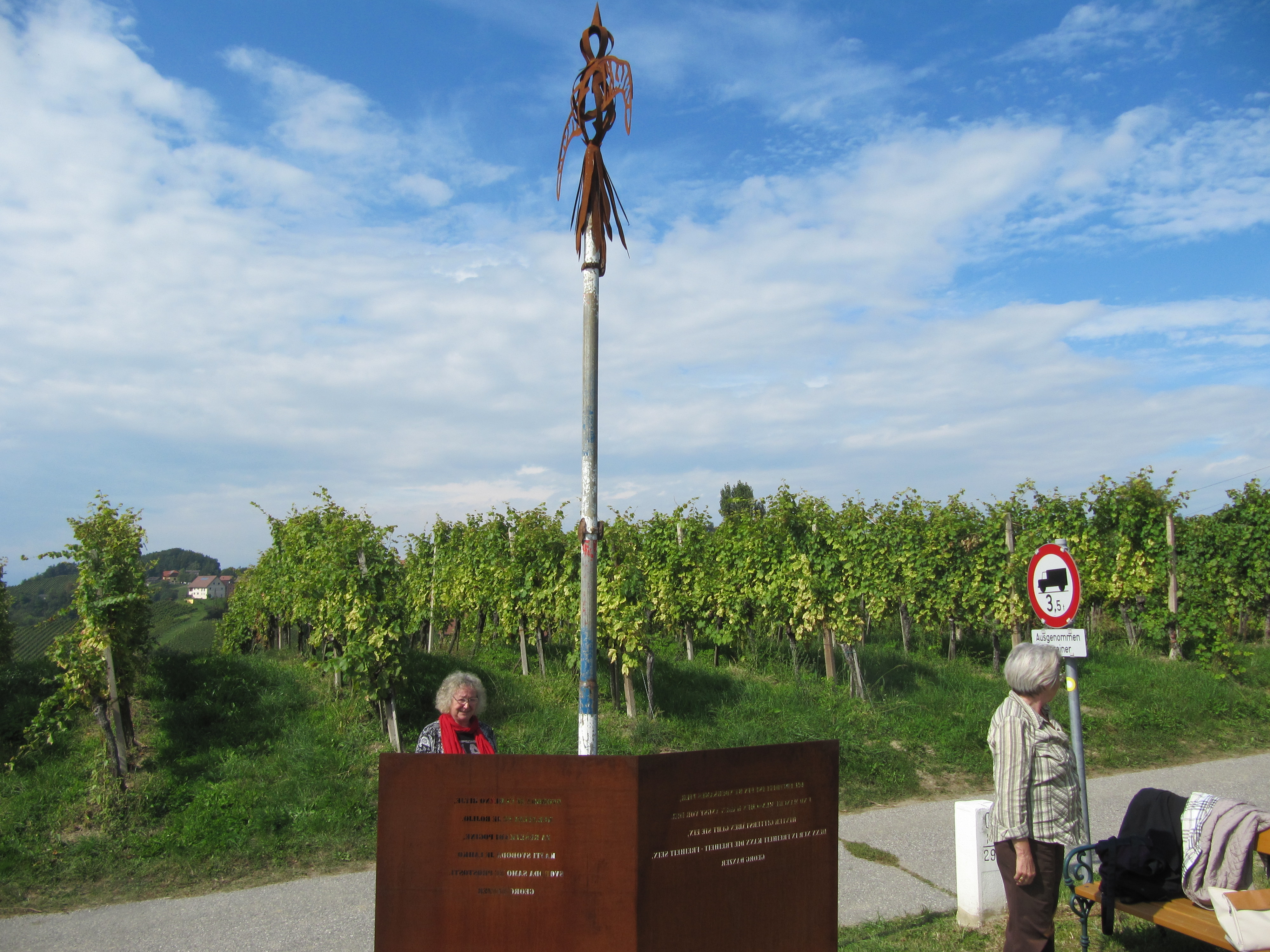 an der grünen Grenze zu Slovenien, unter Verwendung des früheren Grenzbalken. Idee und Entwurf von Günter Orban Dieses Bild wurde anlässlich des österreichischen Tags des Denkmals 2016 in der Steiermark eingereicht.